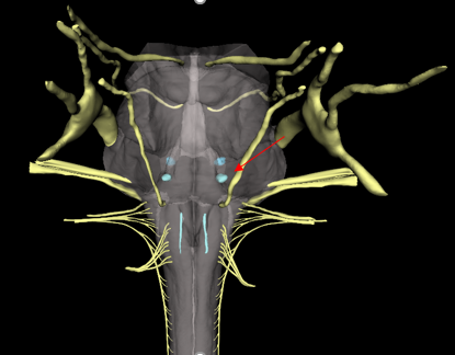 Irudi honetan entzefalo enborra eta bertako zenbait nukleo ikusten dira. Gezi gorriak abducens-nerbioaren nukleoa seinalatzen du.